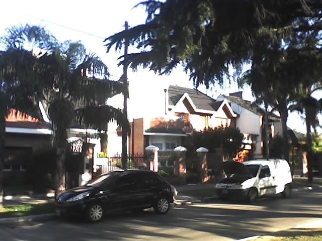 Avenida 25 de Mayo, Merlo, Provincia de Buenos Aires.